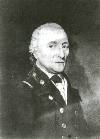 Gustav Heinrich von Wetter-Rosenthal (1753-1829)